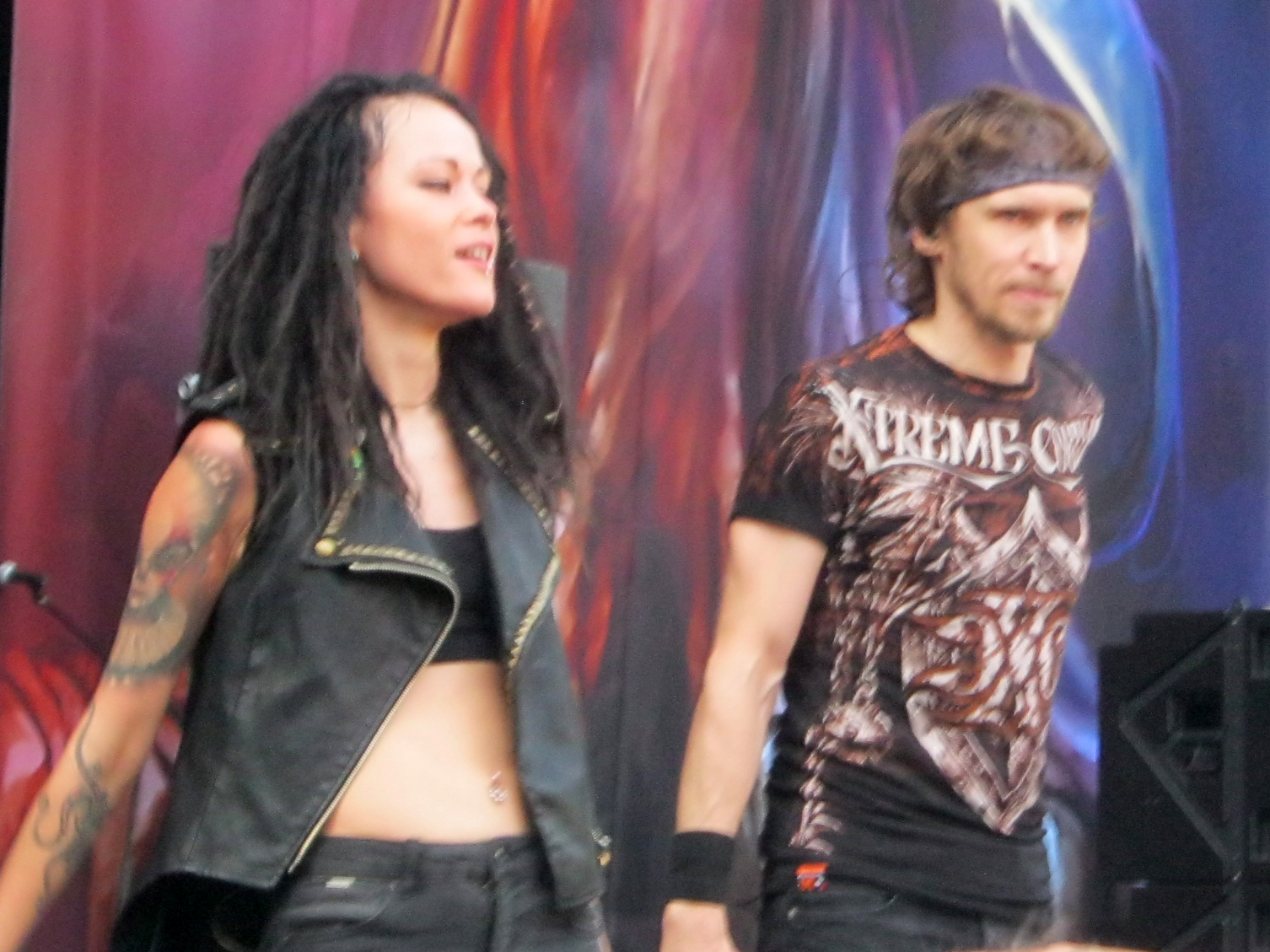 Vocalists of Russian band Slot, at Ariafest 2016